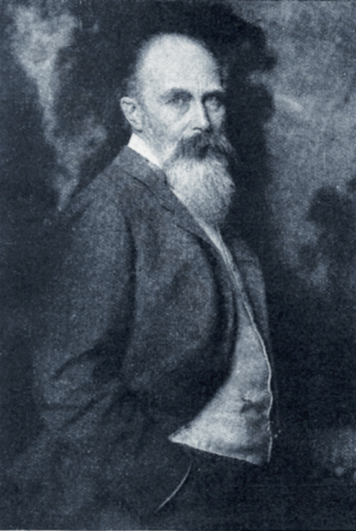 Eugen Bracht auf einer Fotografie von Nicola Perscheid; Bearbeitung (Schriftzugentfernung) durch die Wikipedia Fotowerkstatt